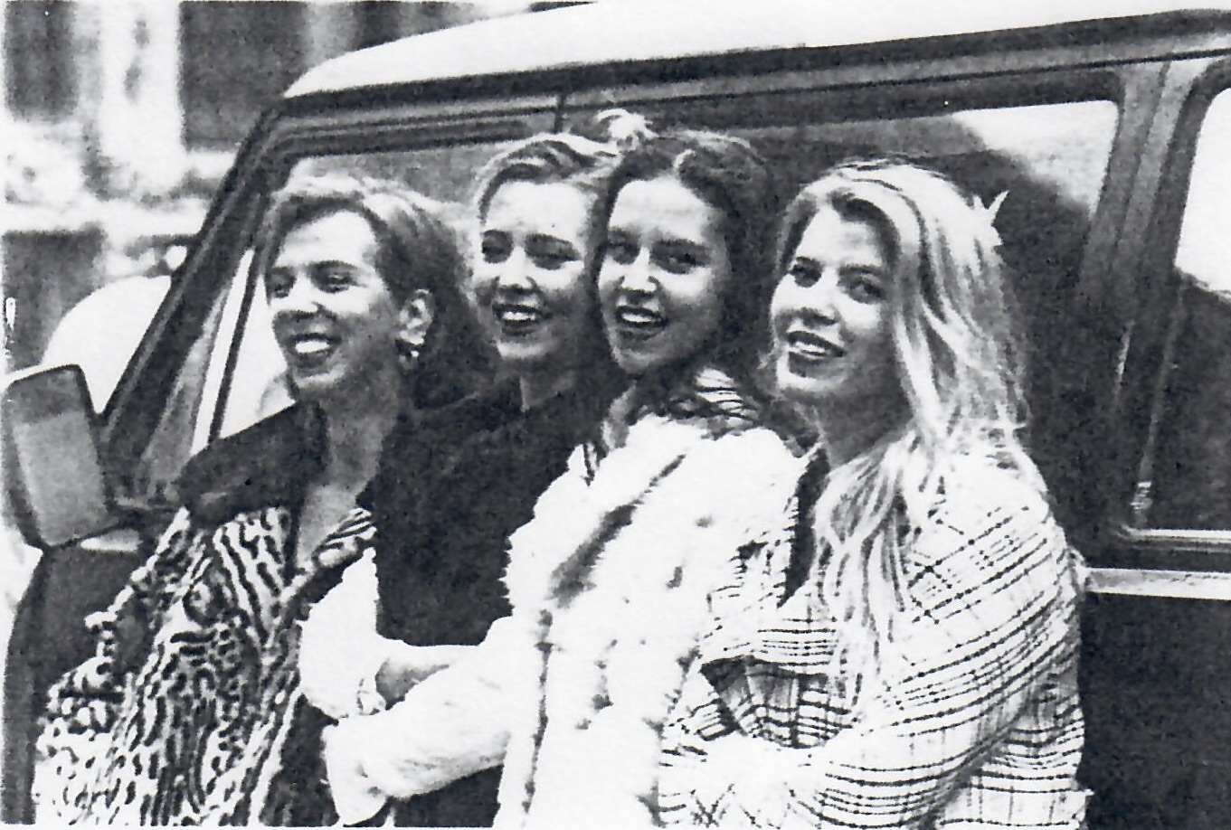 von links nach rechts: Uta Wagner, Daniela Kaul, Eva Risch, Anke Kaul, die Band "Lily of the valley" vor ihrem Tour Bus Ende der 90er